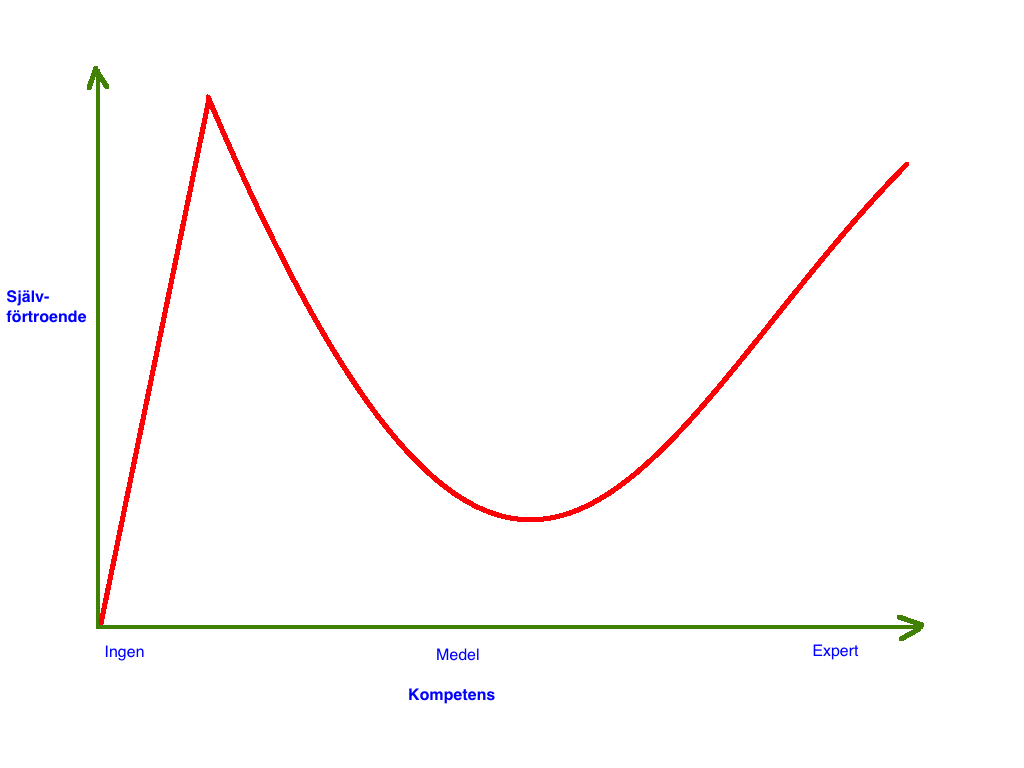 En kognitiv bias som innebär att den som är inkompetent också är oförmögen att förstå att denne är inkompetent